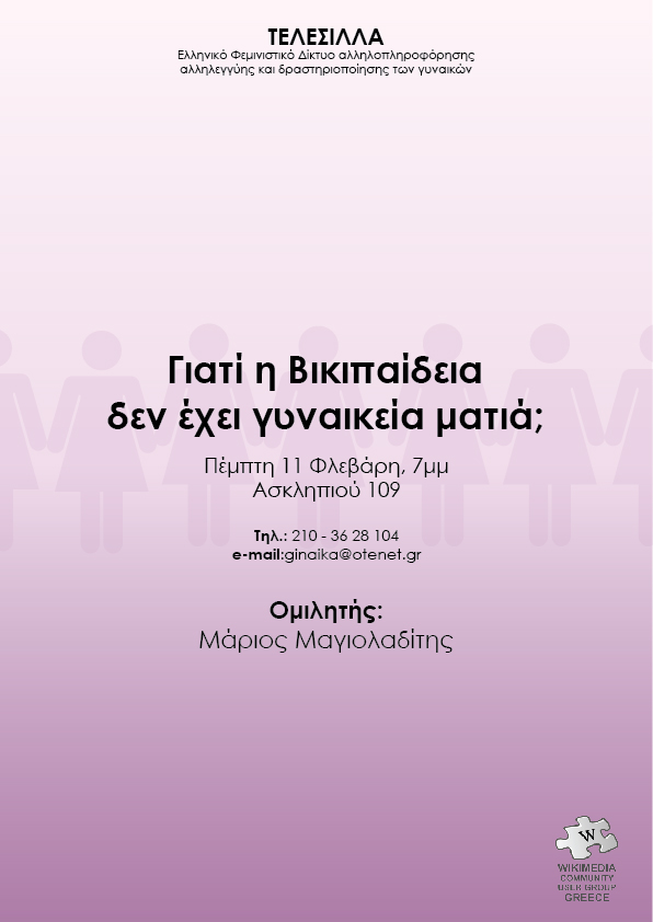 Ομιλία: «Γιατί η Βικιπαίδεια δεν έχει γυναικεία ματιά;». Διοργάνωση: Ελληνικό Φεμινιστικό Δίκτυο Αλληλοπληροφόρησης, αλληλεγγύης και δραστηριοποίησης των γυναικών. Ημερομηνία: 11 Φεβρουαρίου , Ασκληπιού 109, Αθήνα. Ομιλητής: Μάριος Μαγιολαδίτης